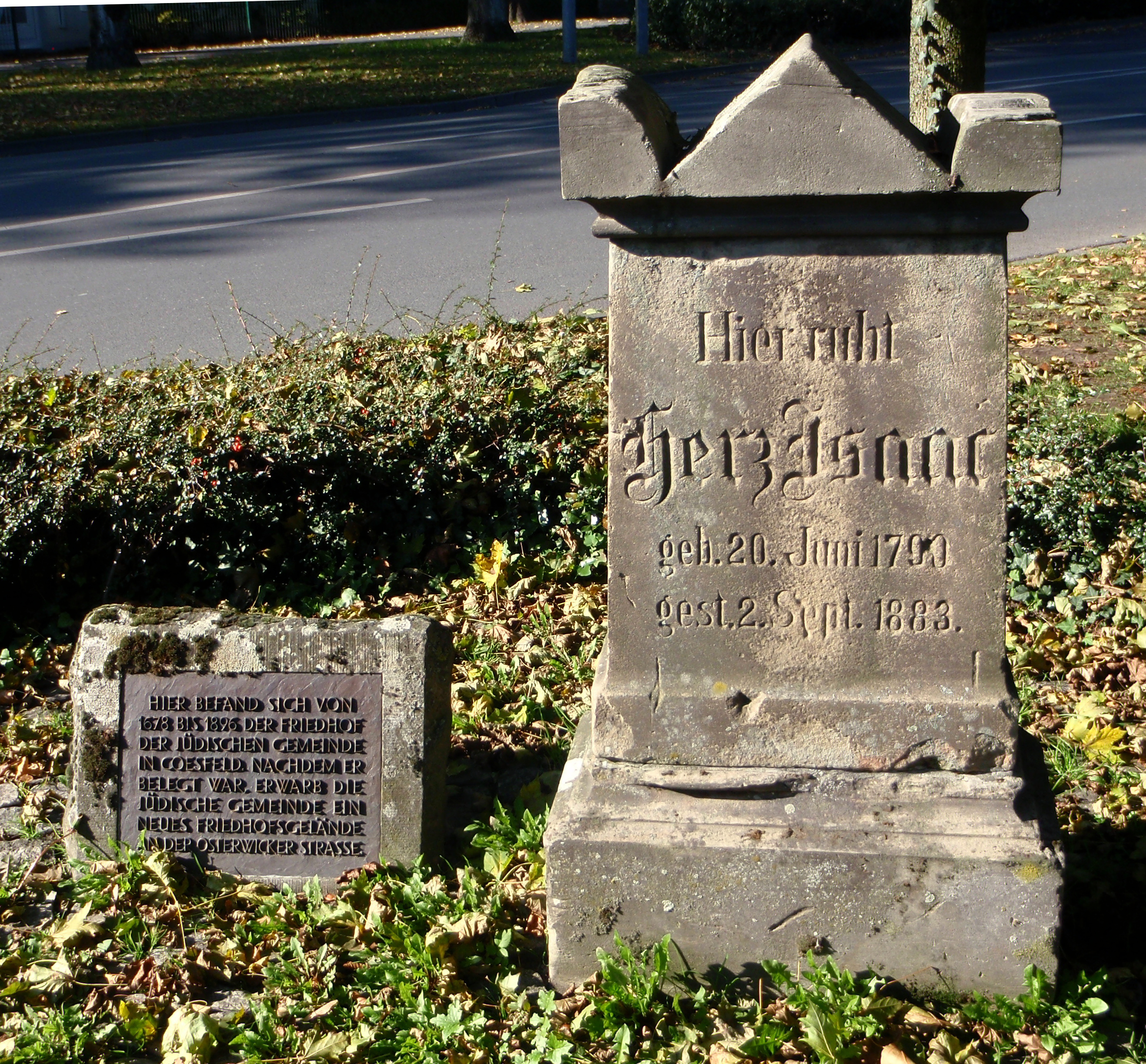 Vom alten jüdischen Friedhof in Coesfeld, der von 1678 bis 1896 für Bestattungen genutzt wurde, ist nur noch ein Grabstein zur Erinnerung vorhanden. Das Monument befindet sich neben der Zentrale der VR-Bank am Gerichtsring. Der "neue" jüdische Friedhof befindet sich an der Osterwicker Straße.